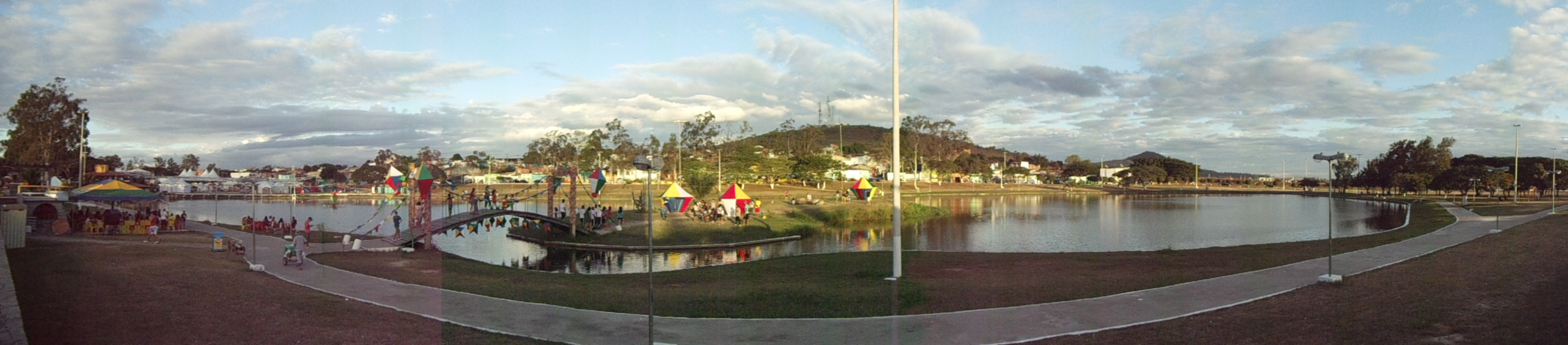 Panorama do Parque Poliesportivo da Lagoa em Itapetinga